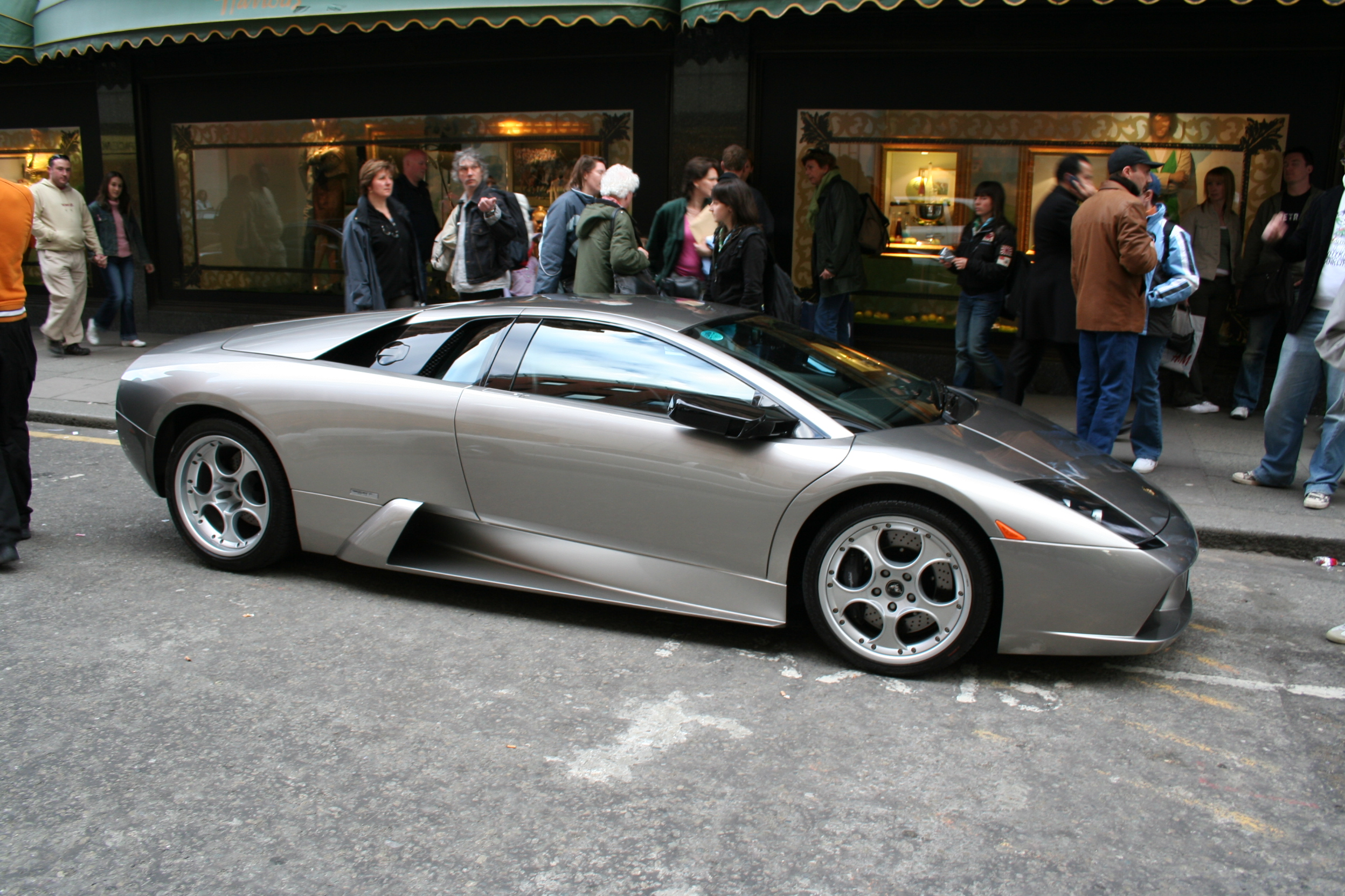 Lamborghini murcielago in London